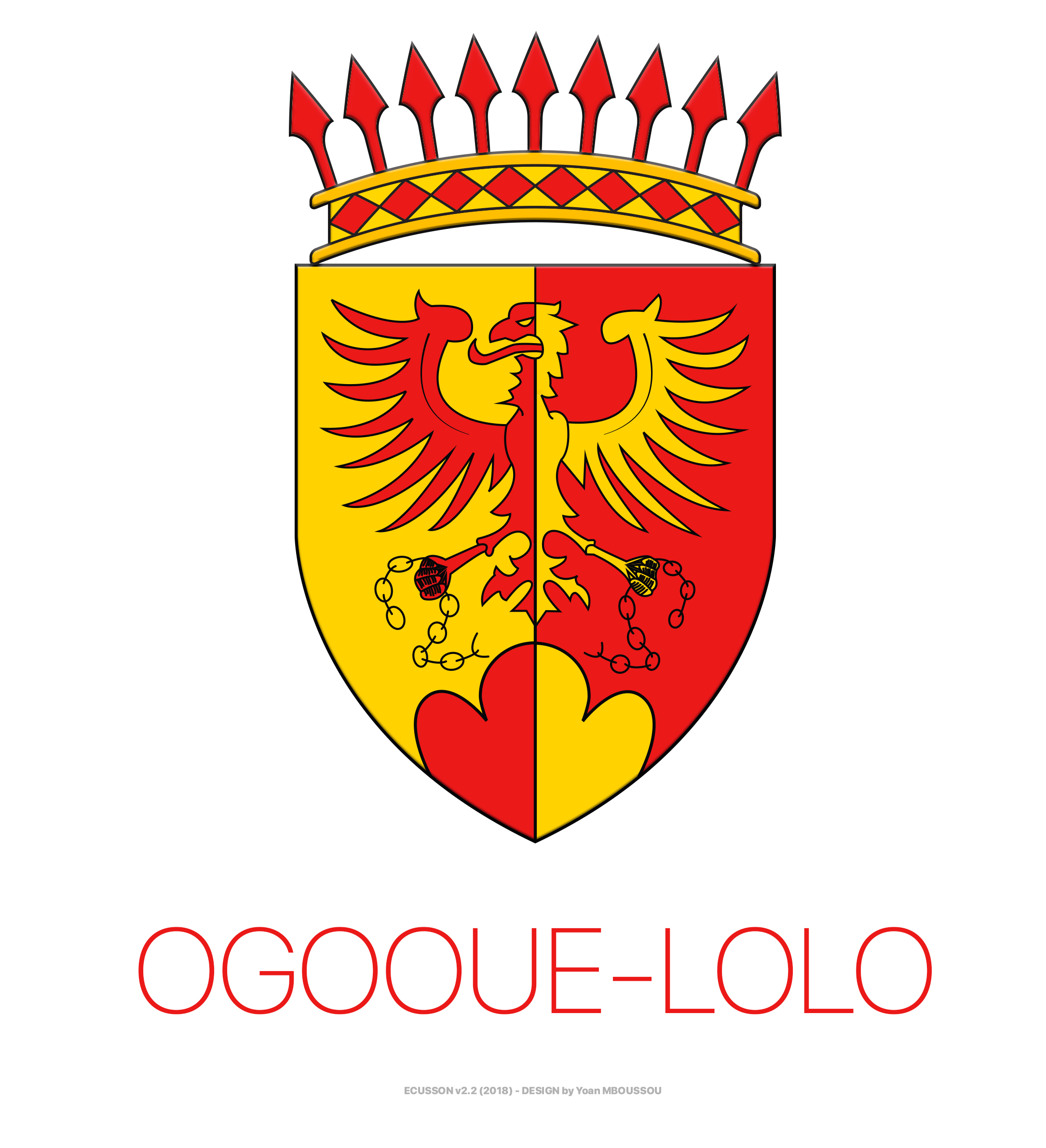 Ecusson de l’Ogooué-Lolo